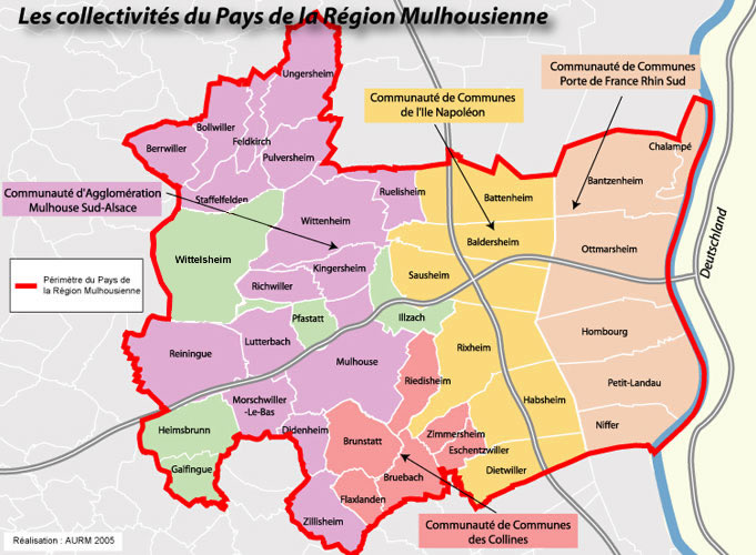 Carte du Pays de la Région Mulhousienne